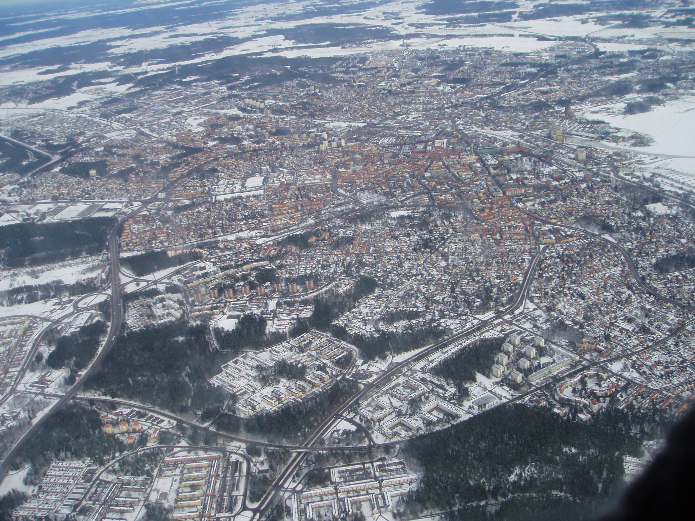 Tagen 3000' ovanför Västerås